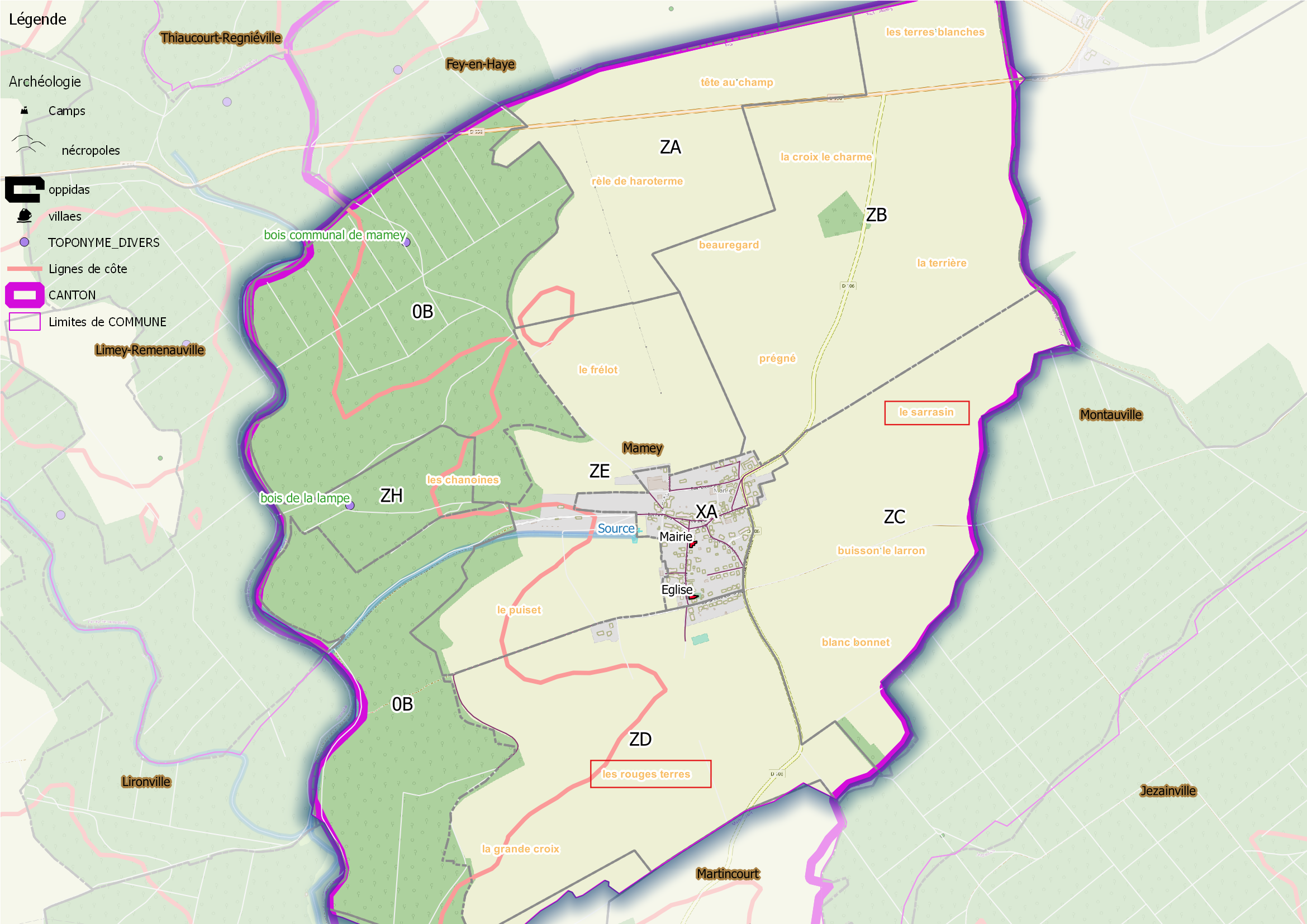 Mamey (ban communal), OSM et Qgis, mentions additionnelles